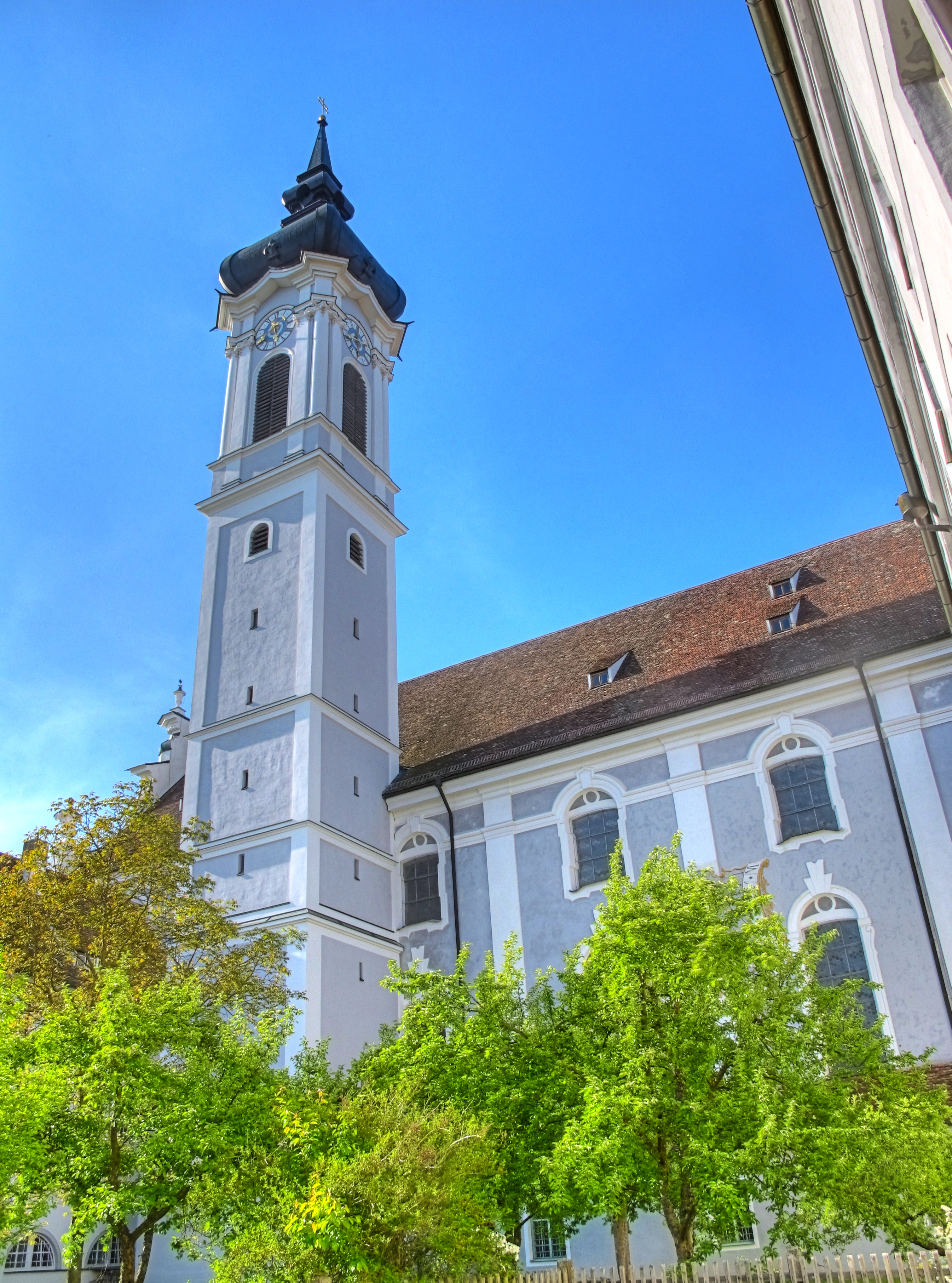 Deutschland, Bayern, Landkreis Landsberg am Lech, Dießen am Ammersee, Marienmünster, Glockenturm